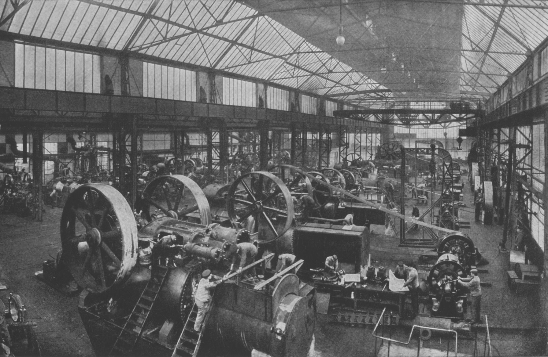 „Prüffeld des Werkes Salbke für die fertigen Lokomobilen, Flächeninhalt 3500 qm, Stände zum gleichzeitigen Prüfen von 24 Lokomobilen, Leistungsnachweis durch Belastung mit elektrischen Dynamomaschinen“ (Originalbeschreibung)